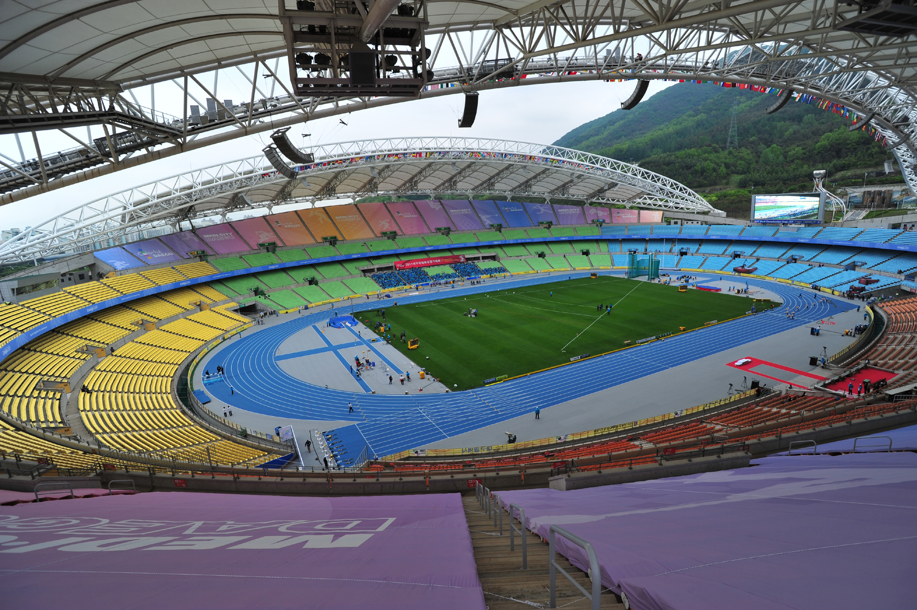 Estadio de Daegu